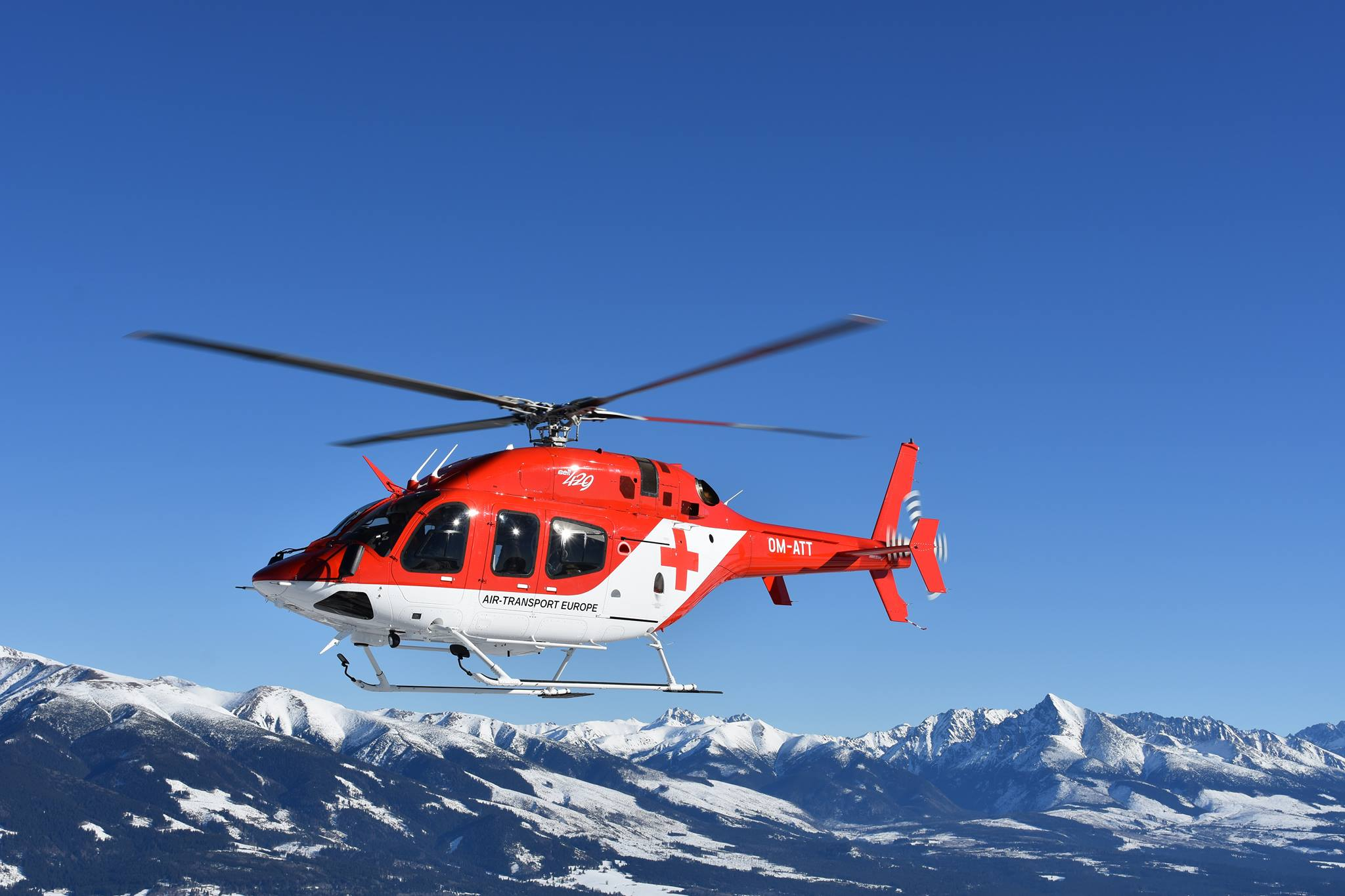 nový vrtuľník typu Bell 429. OM-ATT v službe od r.2017